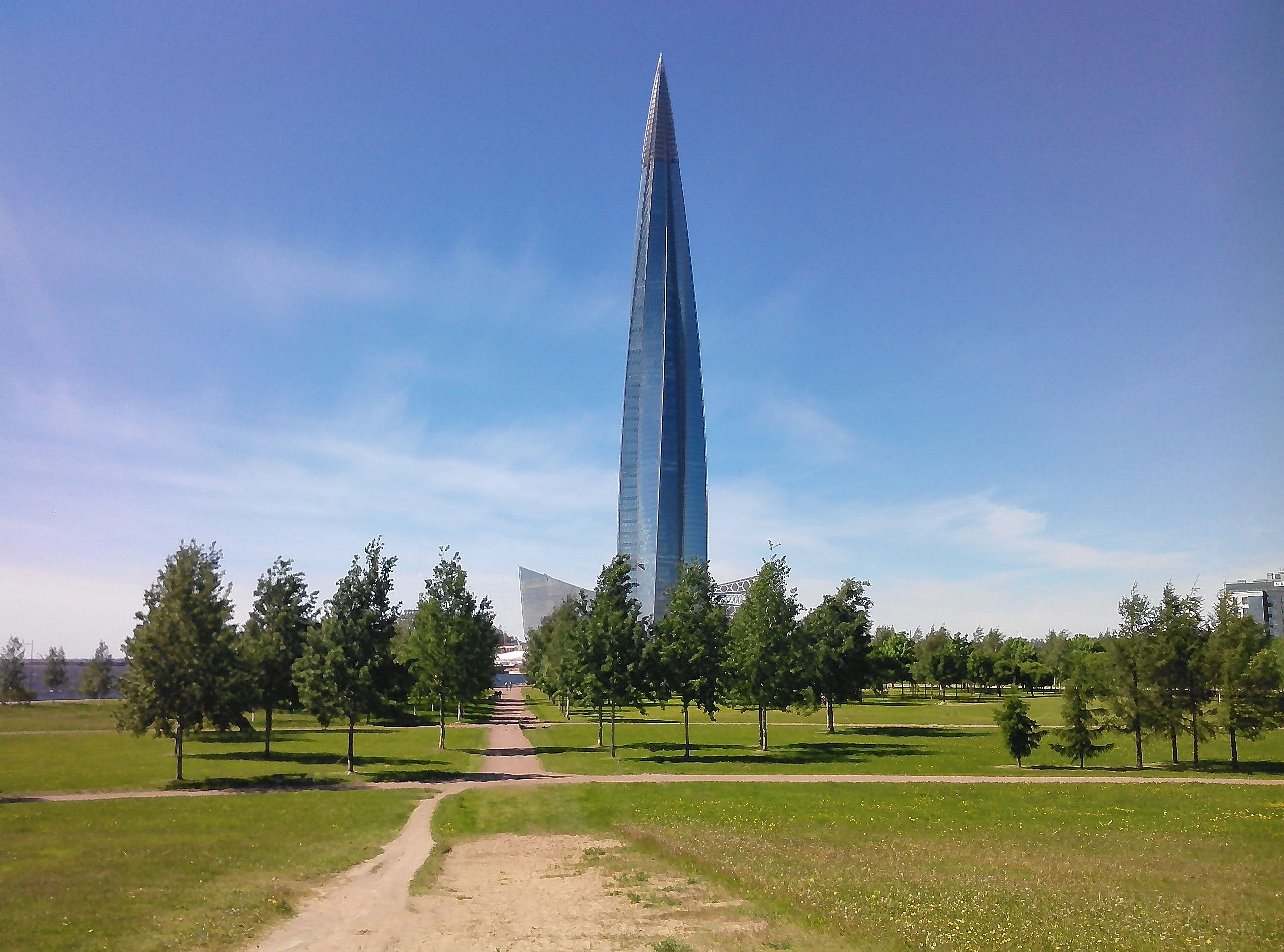 Вид из парка на Лахта-центр